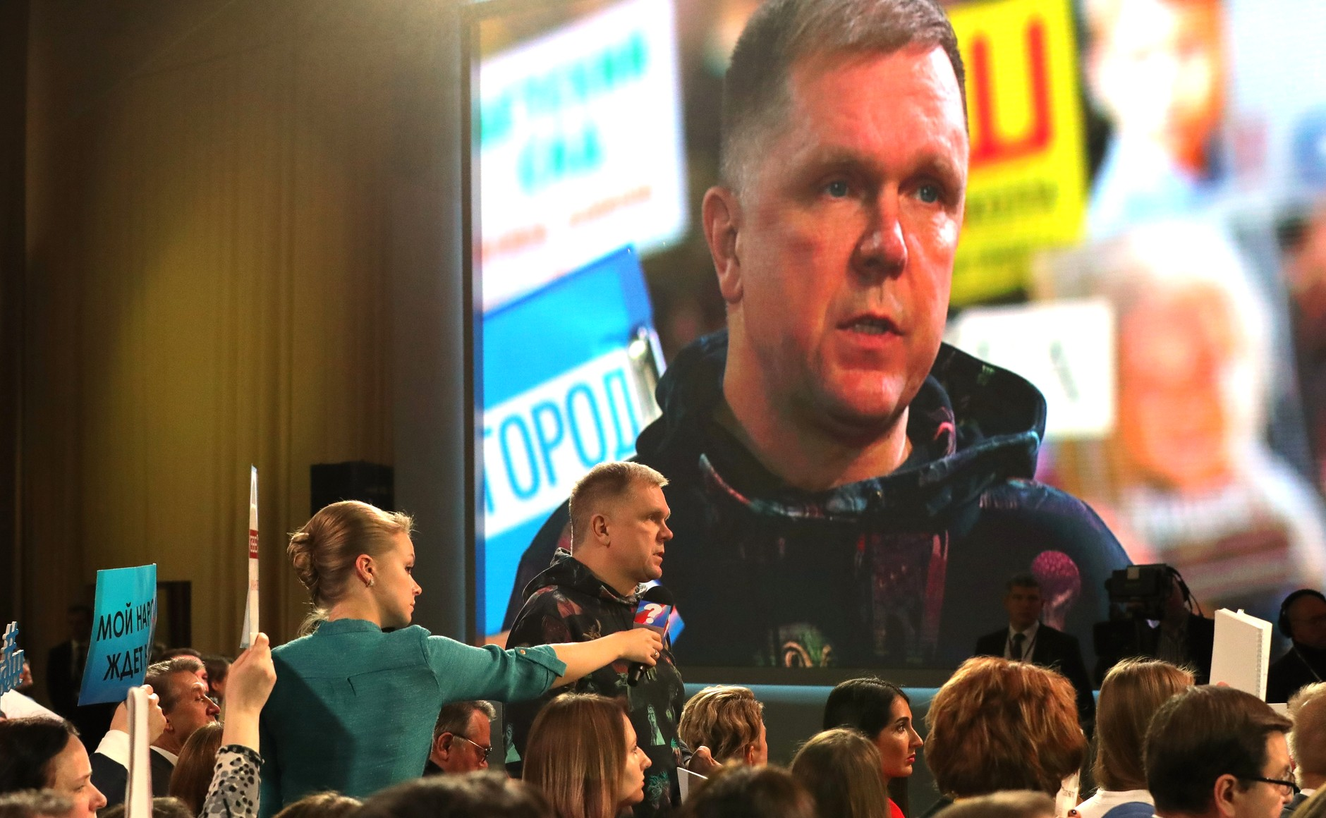 Большая пресс-конференция Президента Российской Федерации Владимира Путина